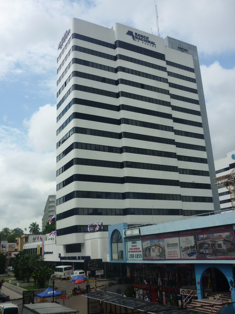 Banco Nacional de Panamá, en vía España de la ciudad de Panamá.